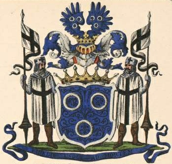 Freytagh von Loringhoveni suguvõsa parunivapp